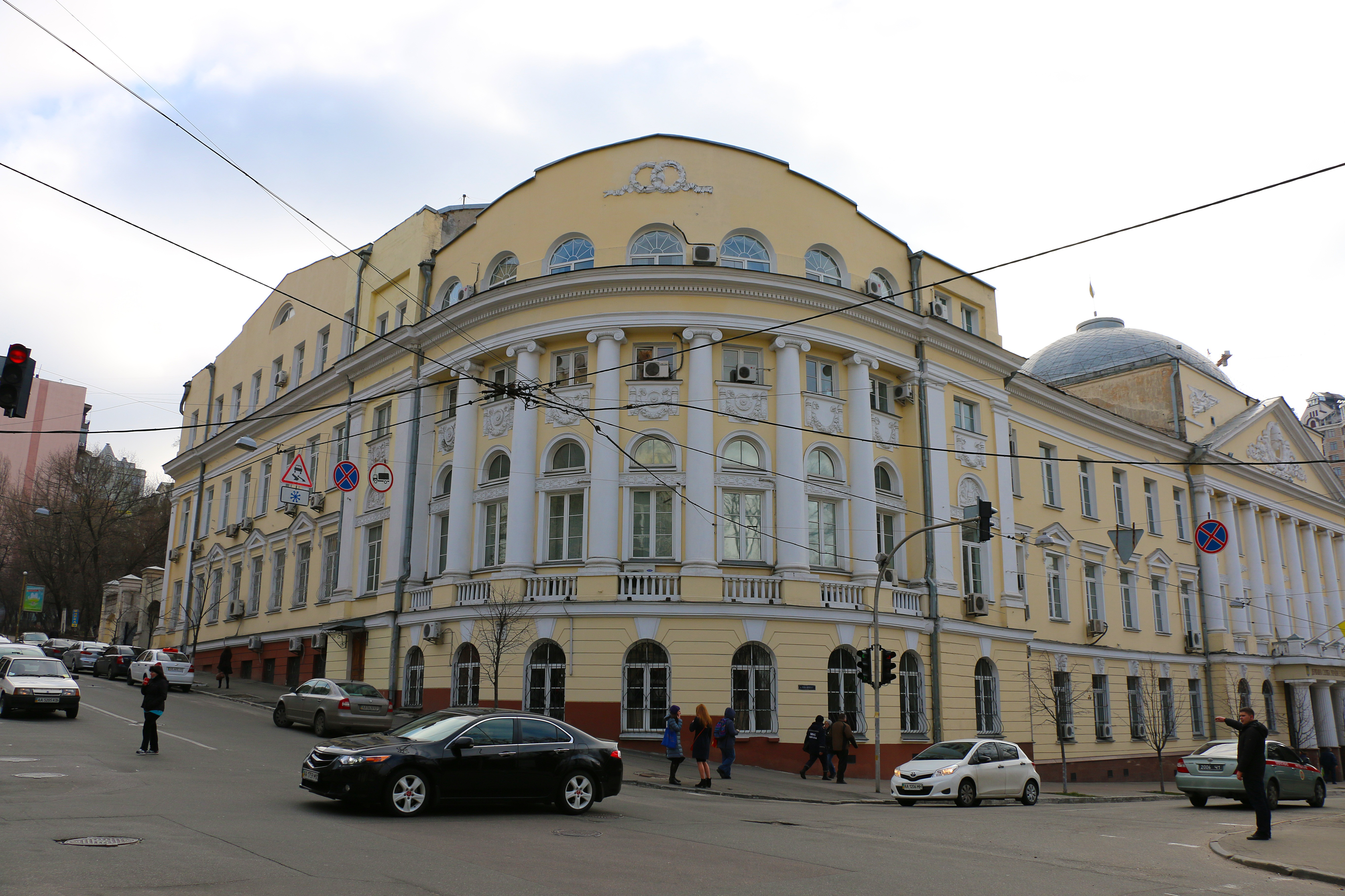 Курси вищі жіночі, Київ, вул. Олеся Гончара, 55а